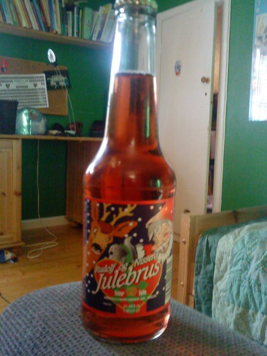 Oskar Sylte julebrus